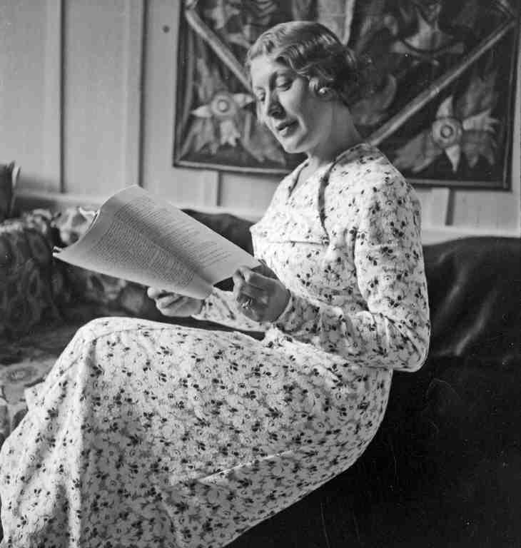 Hedwig Kopp, Künstlernamen Hedda Koppé, Schauspielerin (Schweiz/USA), lesend auf Sofa.